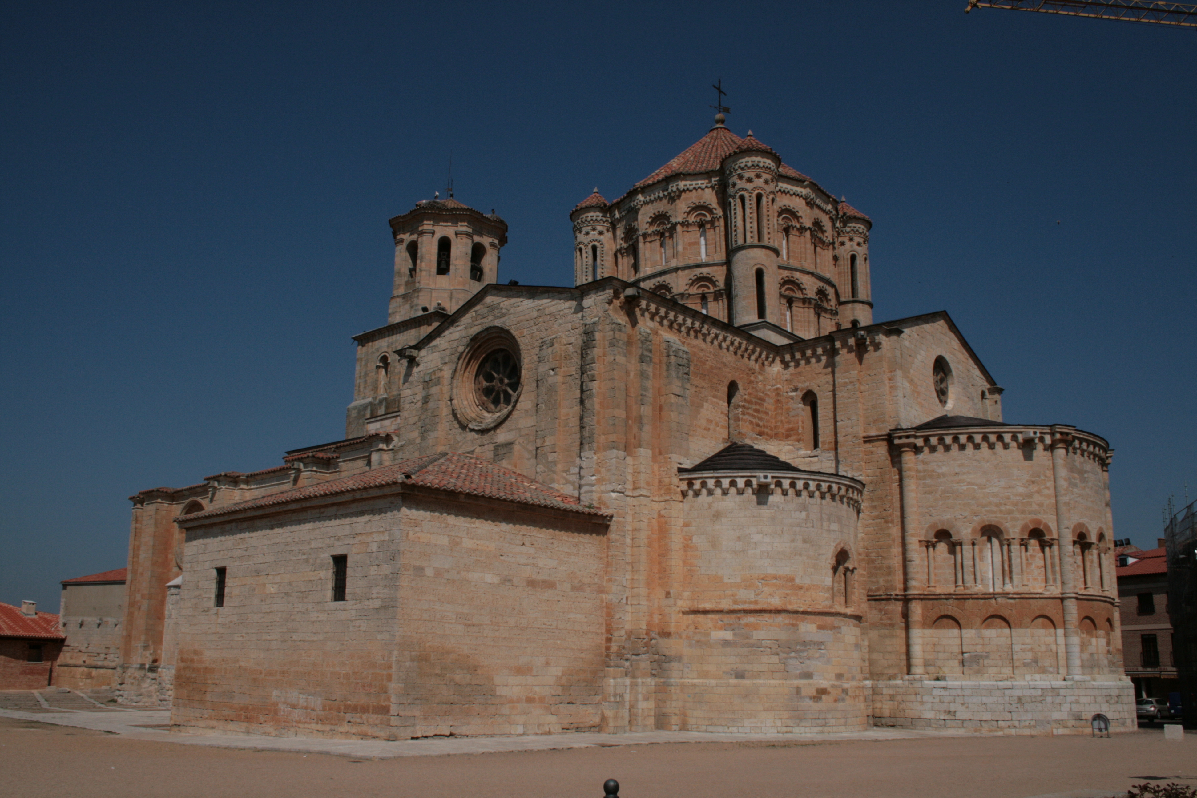 Colegiata de Toro